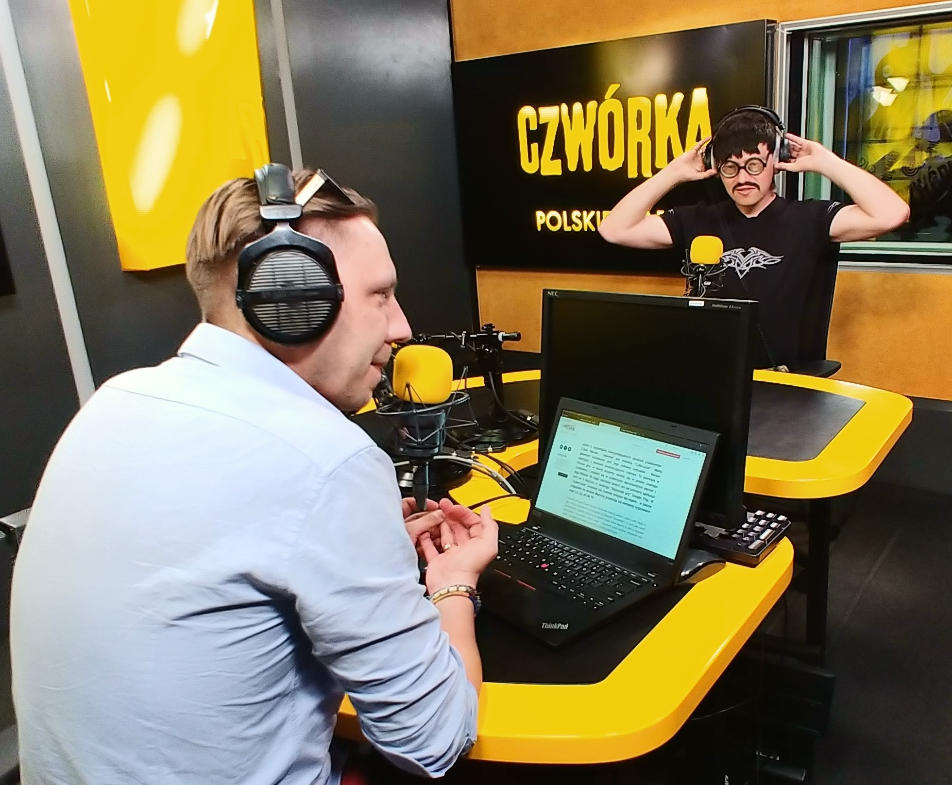 Cyber Marian i Kuba Marcinowicz w Polskim Radio Czwórka (czerwiec 2019 r.)